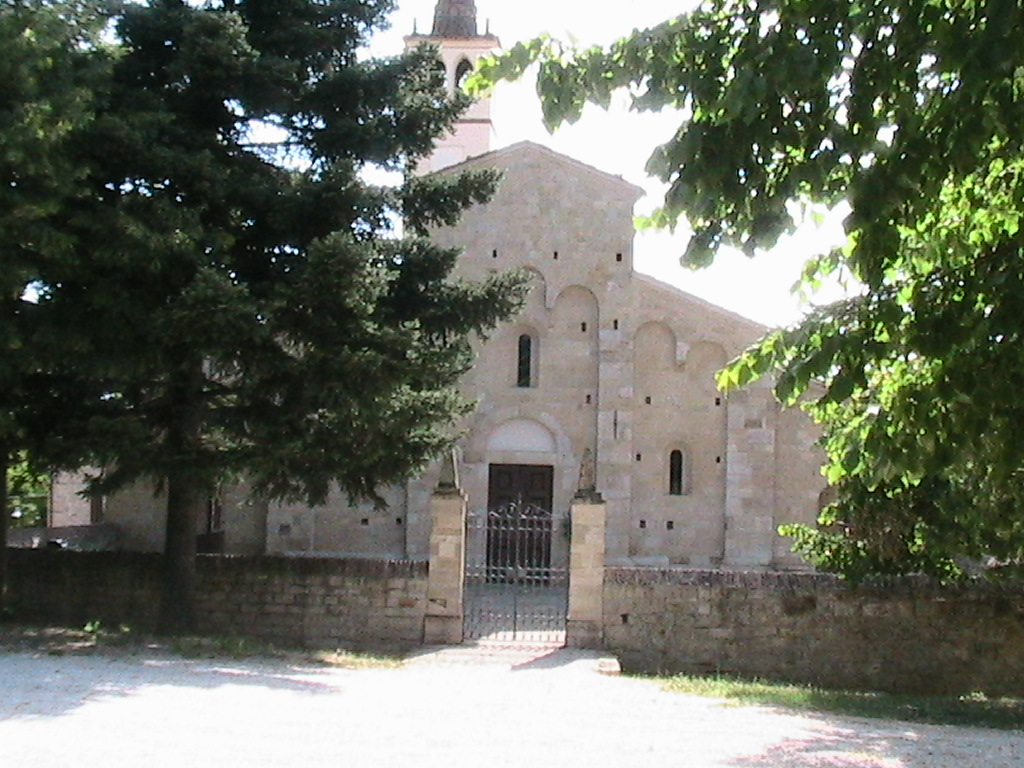 Careno (Pellegrino Parmense) - Santuario della Beata Vergine Assunta